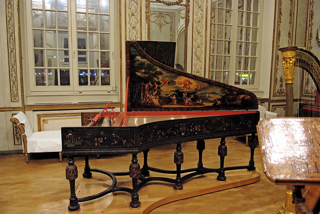 Clavecin de Christian Zell (Hambourg, 1728) - Hambourg, Museum für Kunst und Gewerbe